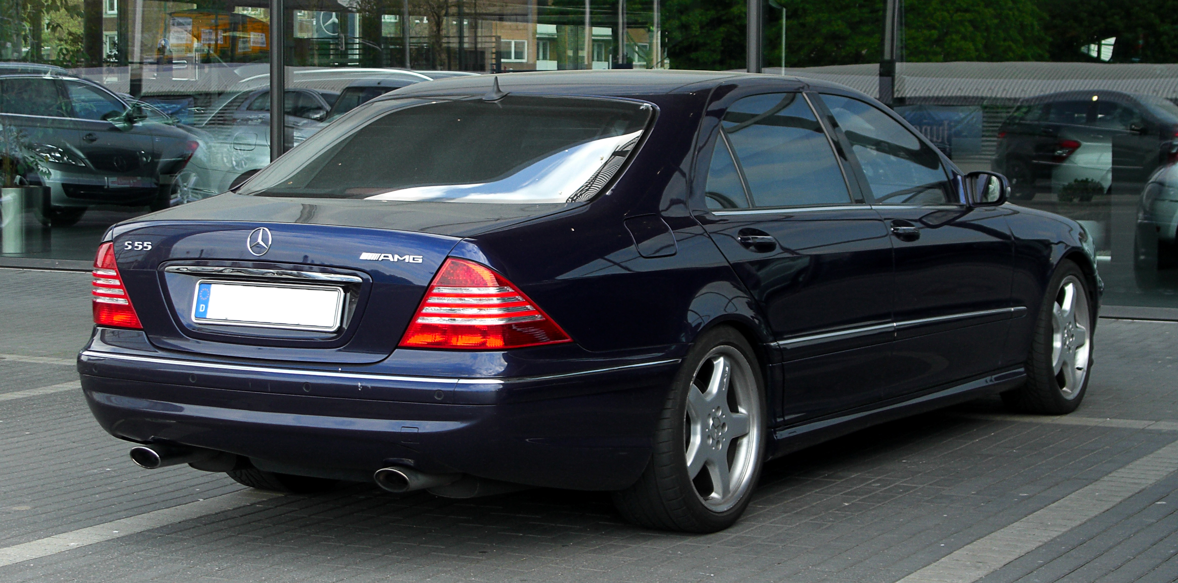 Mercedes-Benz S 55 AMG L (V 220)